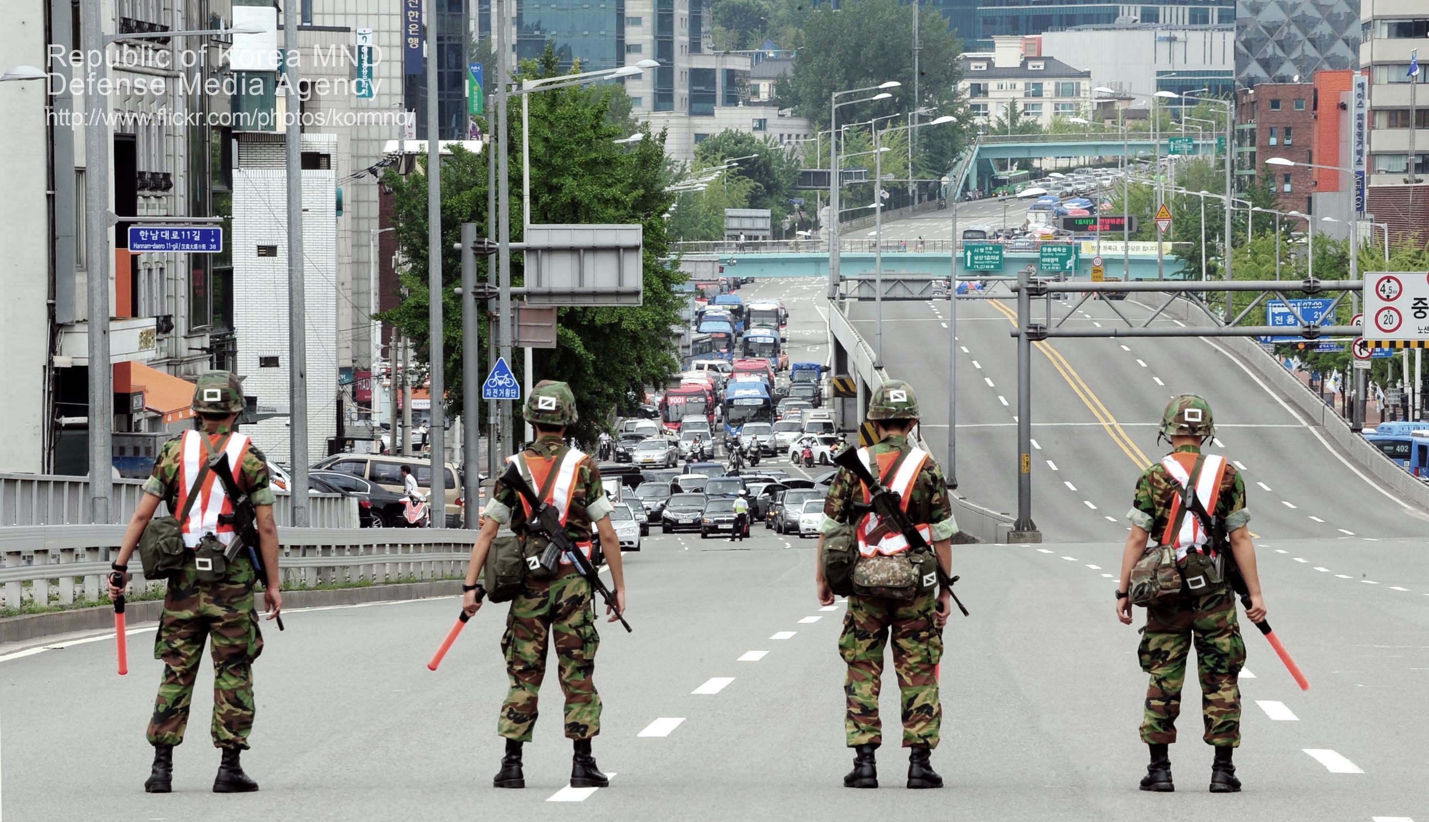 육군 56사단 장병들이 22일 오후 2시 389차 민방위의 날 방공호 대피훈련 때 공습경보 사이렌이 울리자 한남대교 북단에서 남단으로 지나가는 차량들을 통제하고 있다. 이날 훈련은 UFG연습과 연계해 유사시에 대비한 주민 대피와 차량통제에 중점을 두고 같은 시간 전국에서 동시에 진행됐다. 촬영 - 김태형 기자